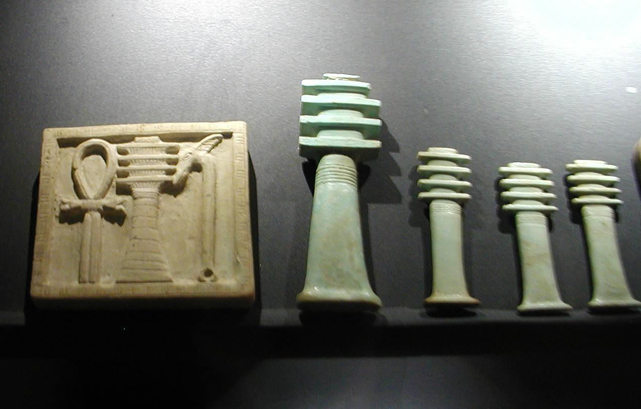 Collection de piliers Djed, Musée national, Alexandrie, Égypte).